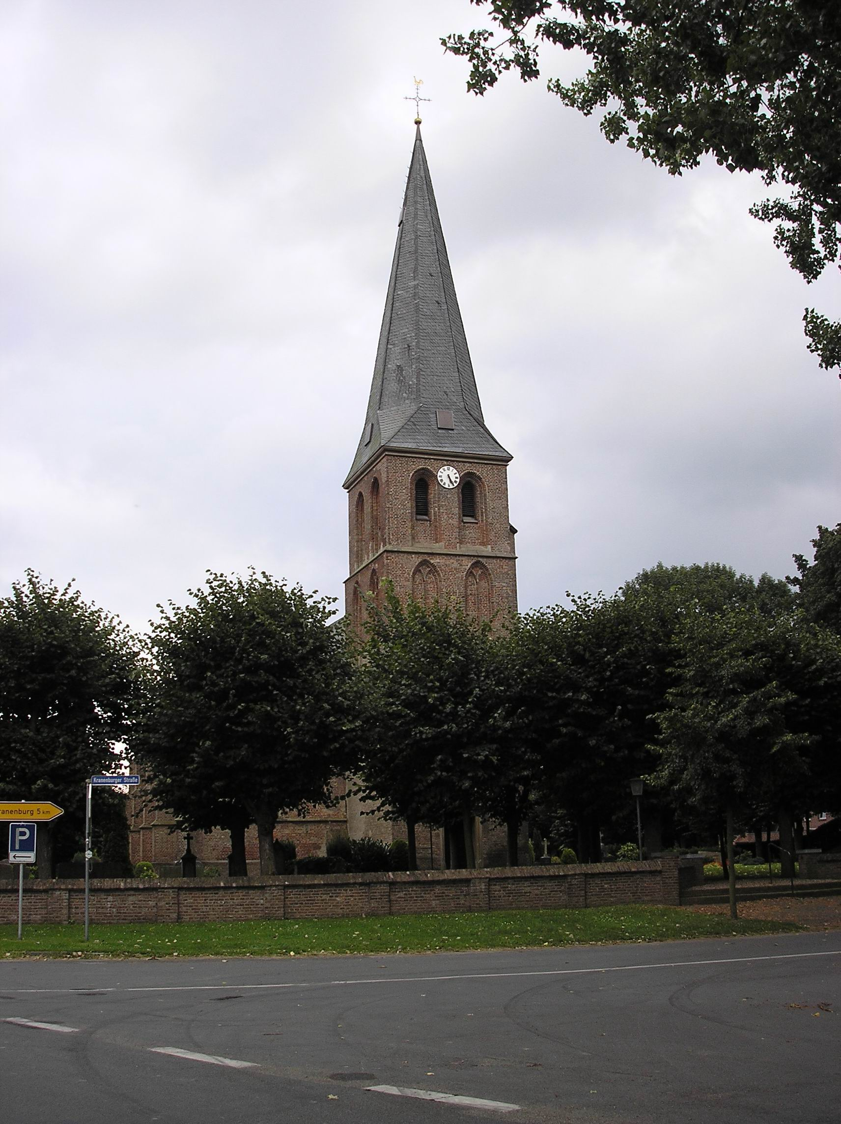 Kirche St. Bonifatius in Niel, Gemeinde Kranenburg, Ansicht von Westen